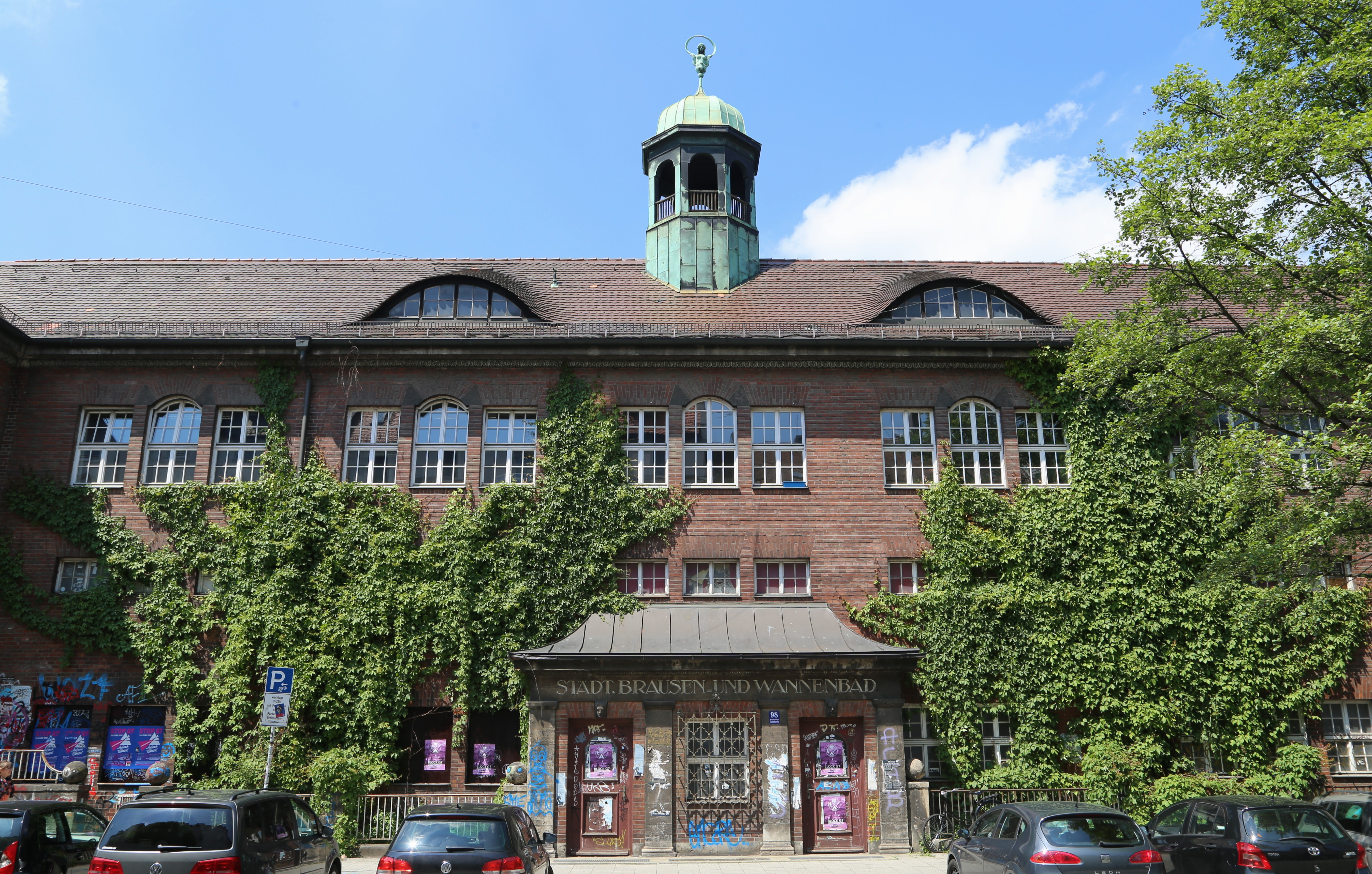 Thalkirchner Straße 96, 98, 100; Schweineschlachthalle und ehem. Städtisches Brause- und Wannenbad, dreigeschossiger Walmdachbau, Hauptfront mit Seitenrisaliten, Eingangsvorbau und Dachreiter, Rohbacksteinbau mit Hausteingliederung, in Formen des Heimatstils, von Adolf Schwiening und Richard Schachner, 1912-13